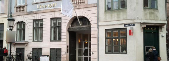 Lån & Spar Bank hovedkontor på Højbro Plads